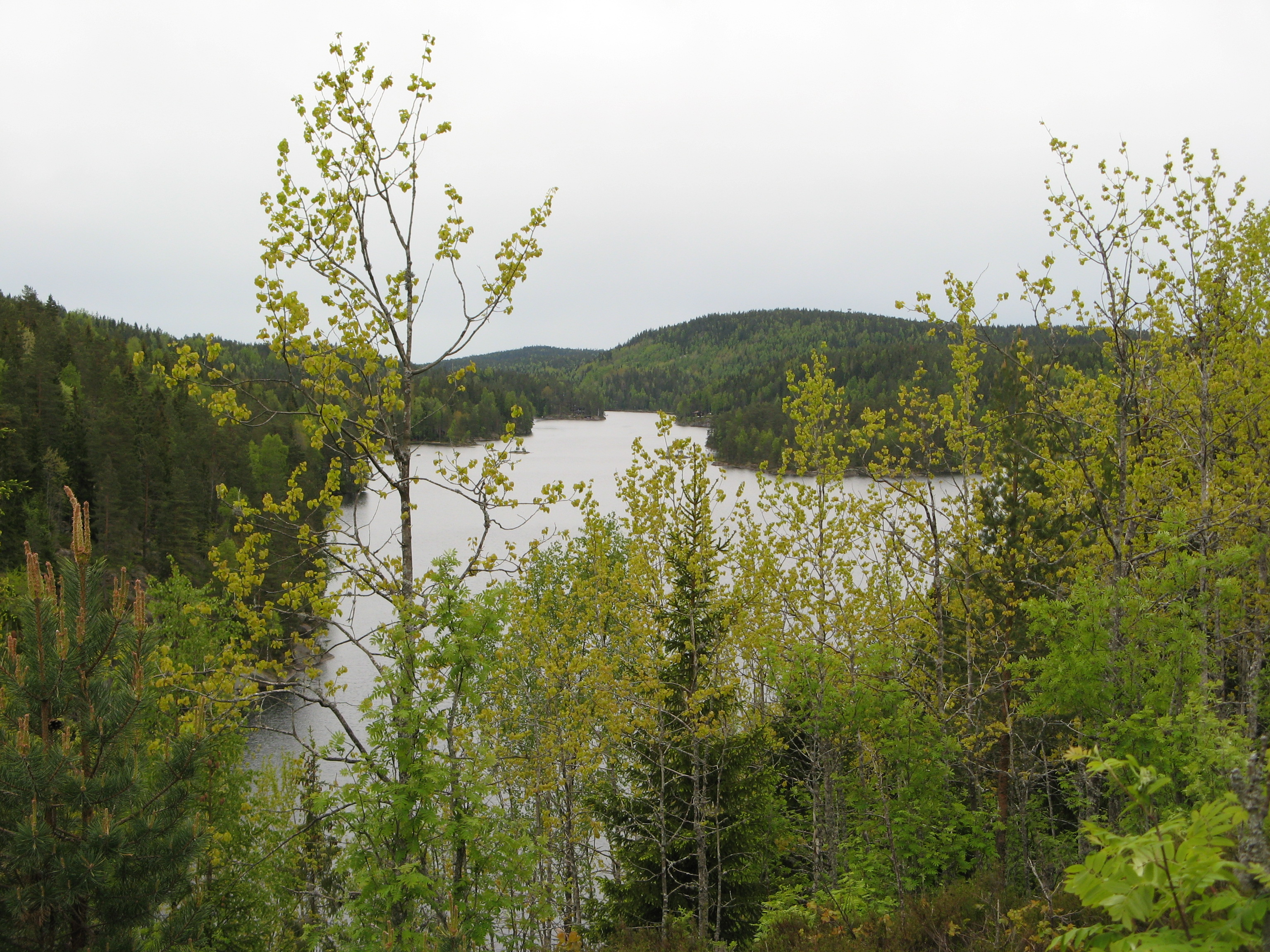 Fra Pølseberget er det et vidt utsyn sørover Mosjøen og mot Kjerringhøgda. Foto: Lise Henriksen, 27.5.07.